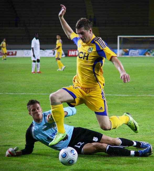 Владимир Лысенко